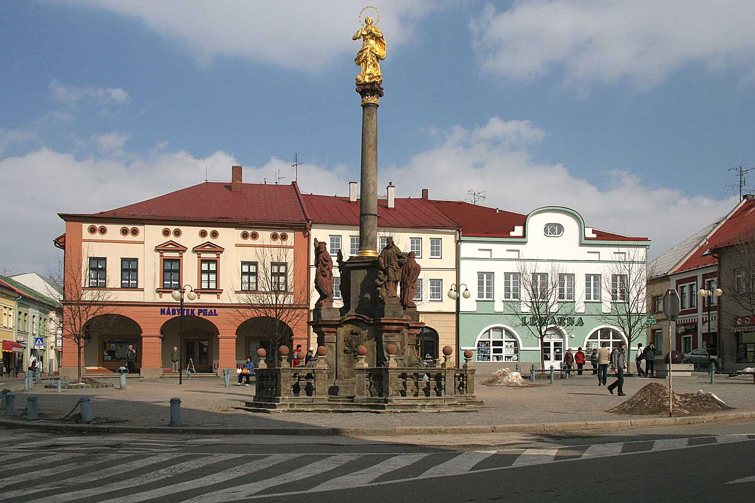 Dobruška, okres Rychnov nad Kněžnou. Náměstí F. L. Věka, mariánský sloup se sochami sv. Jana Nepomuckého, Václava, Floriána a Františka Xaverského, dílo z let 1733 až 1736.